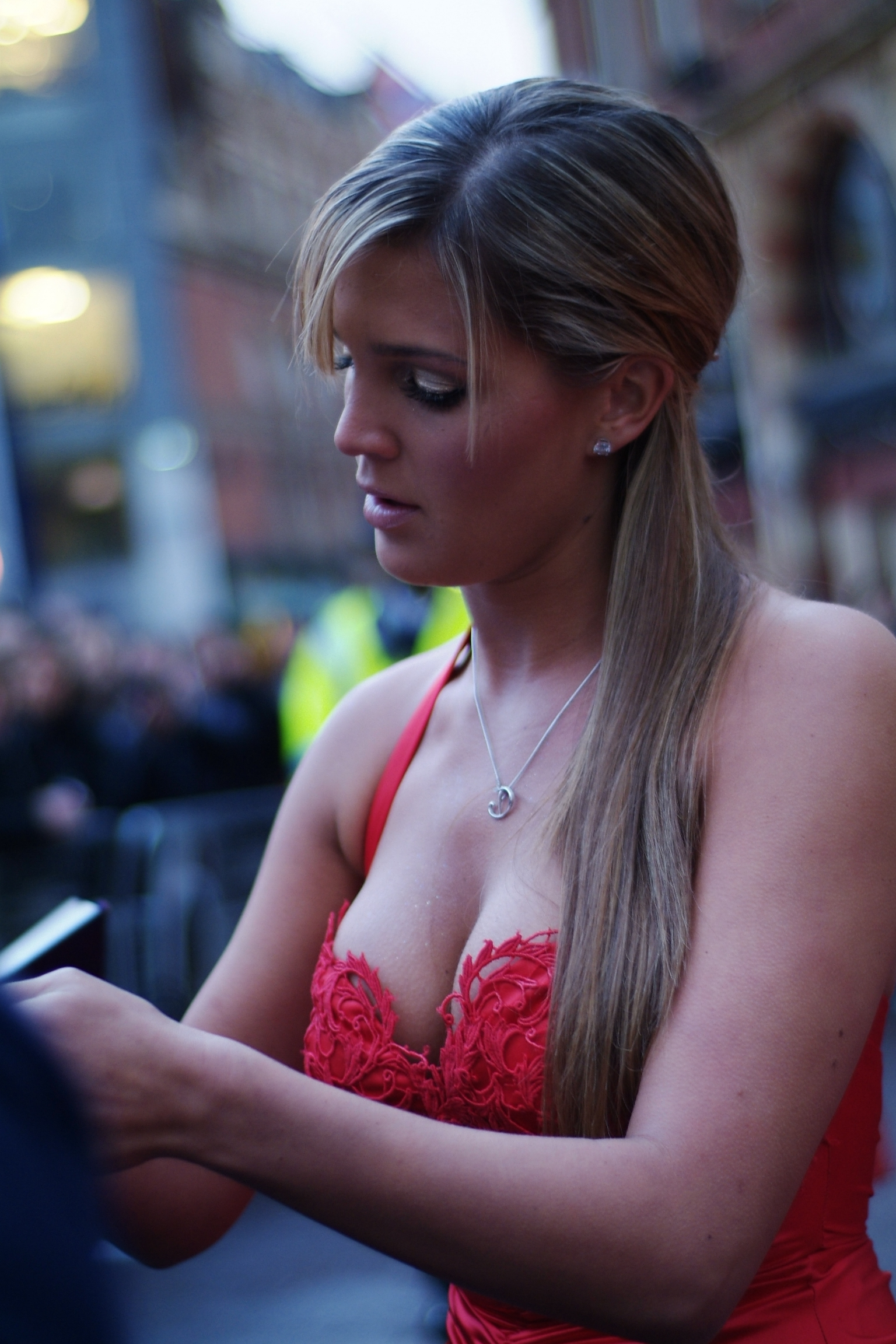 Danielle Lloyd